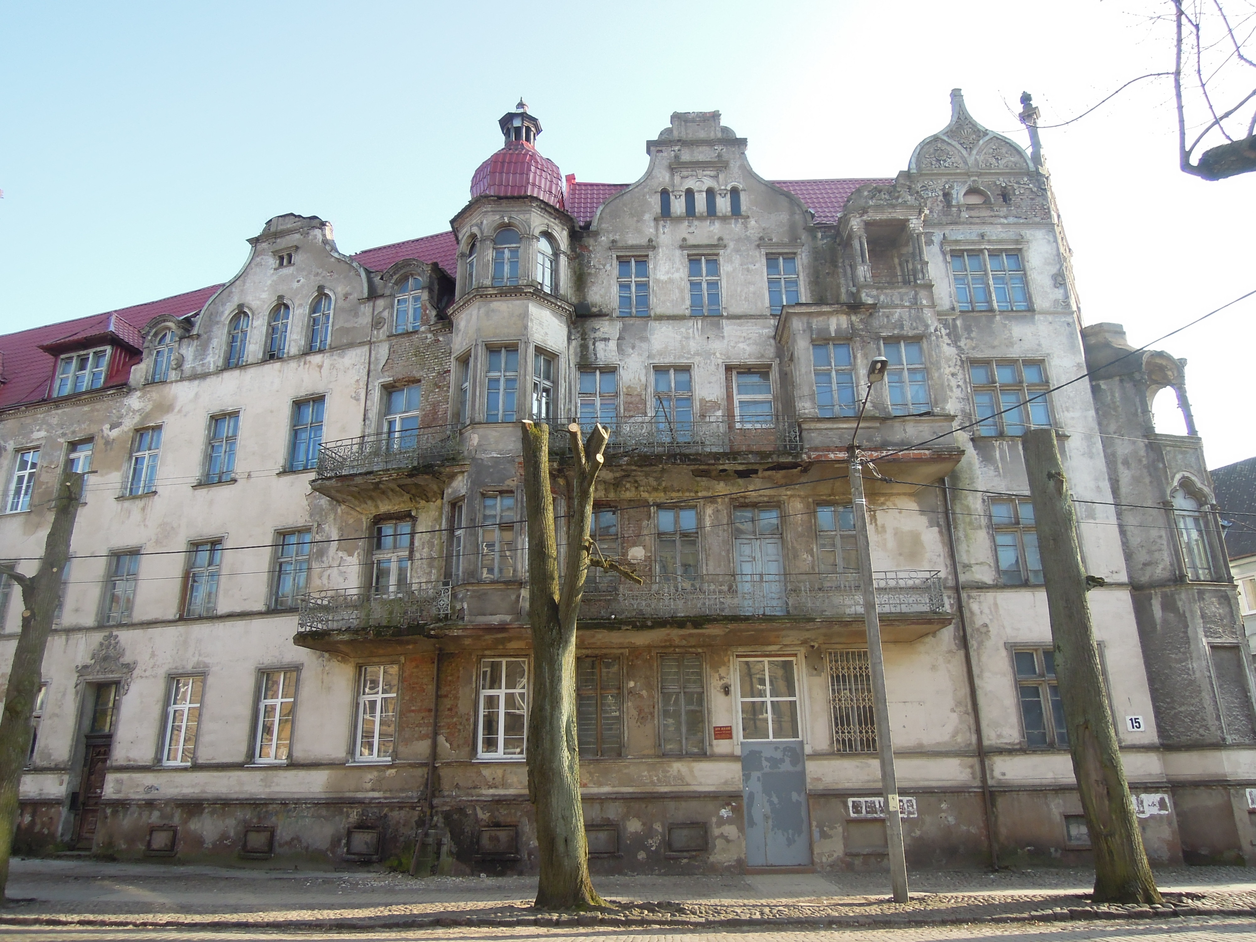 Дом Мюллер-Шталя под угрозой разрушения. 2014 год. Советск, Калининградская область.